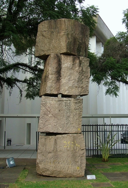 Kcho (1970) - Coluna Infinita, 2002. Acervo do Museu Brasileiro da Escultura